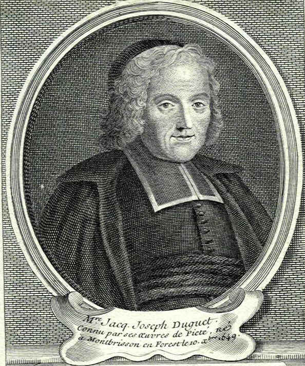 Portrait de Jacques Joseph Duguet